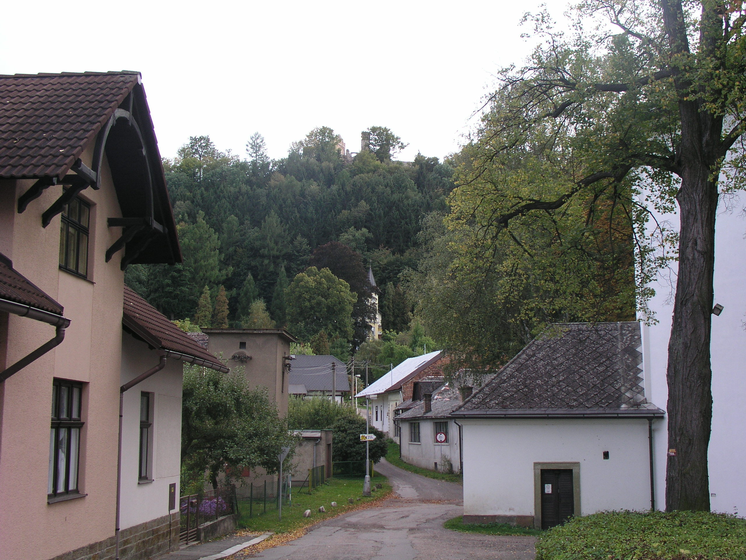 Ulice Na Městečku v Potštejně